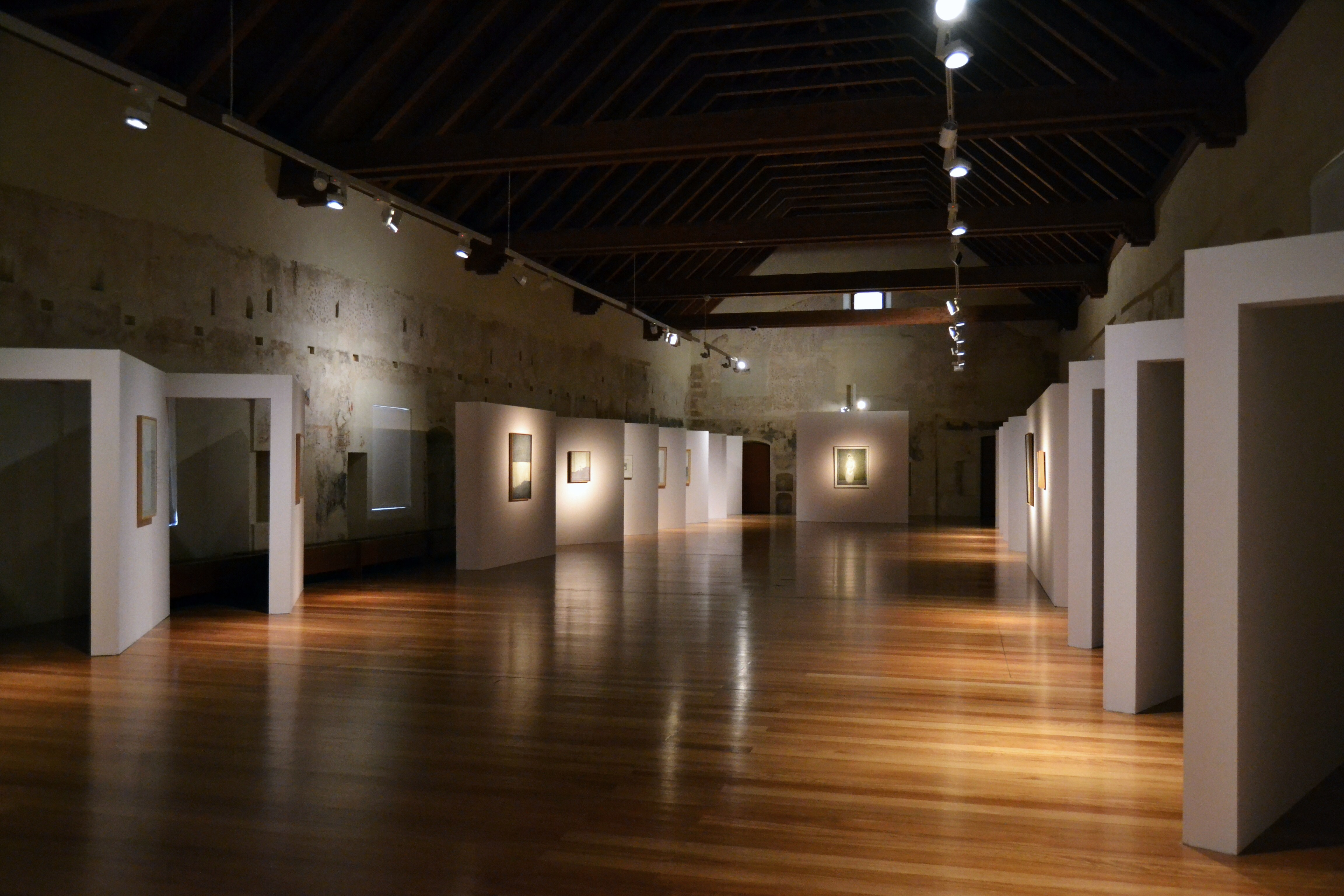 Dormitori del convent del Carme de València.